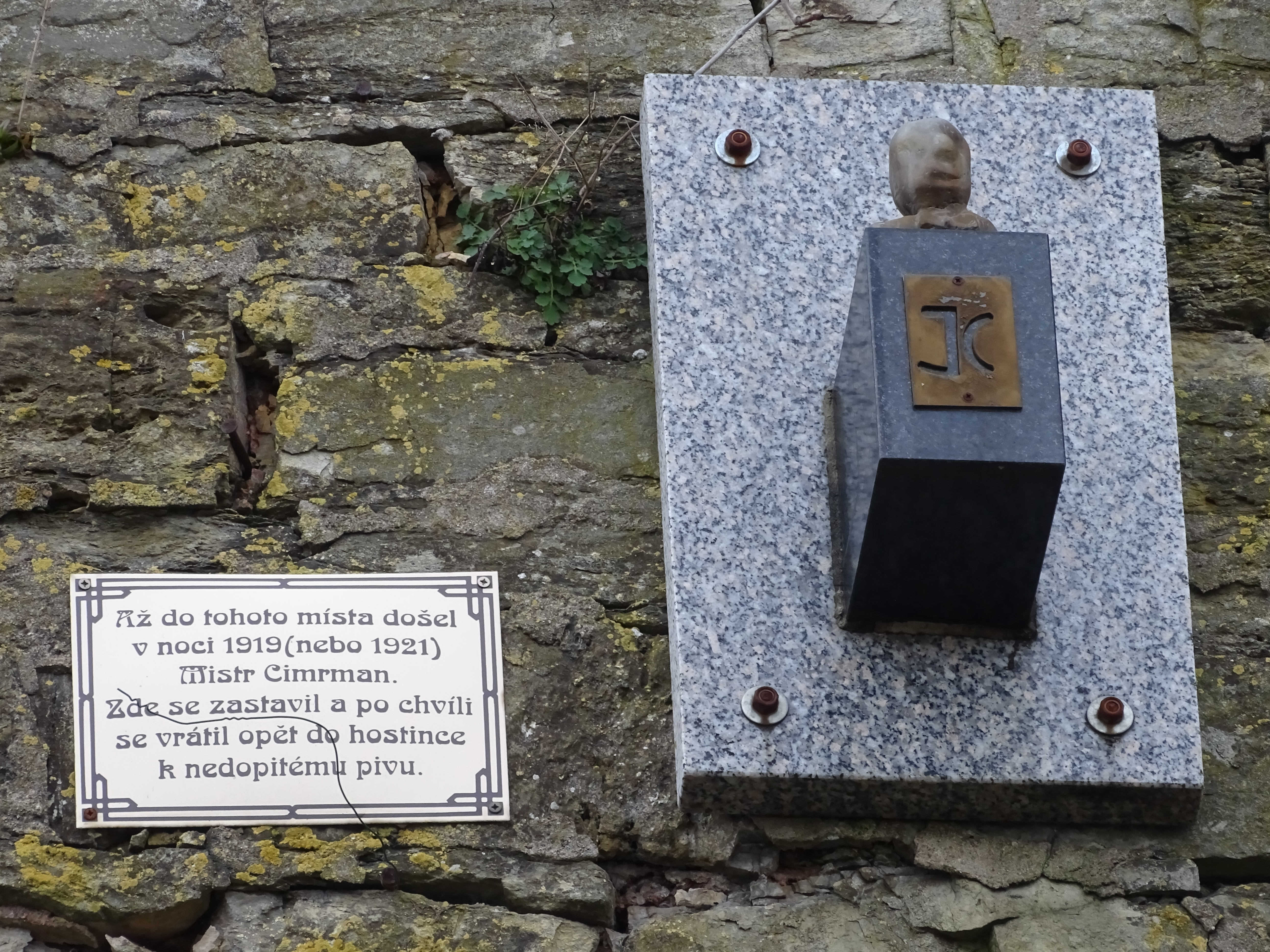 pomník J. Cimrmana